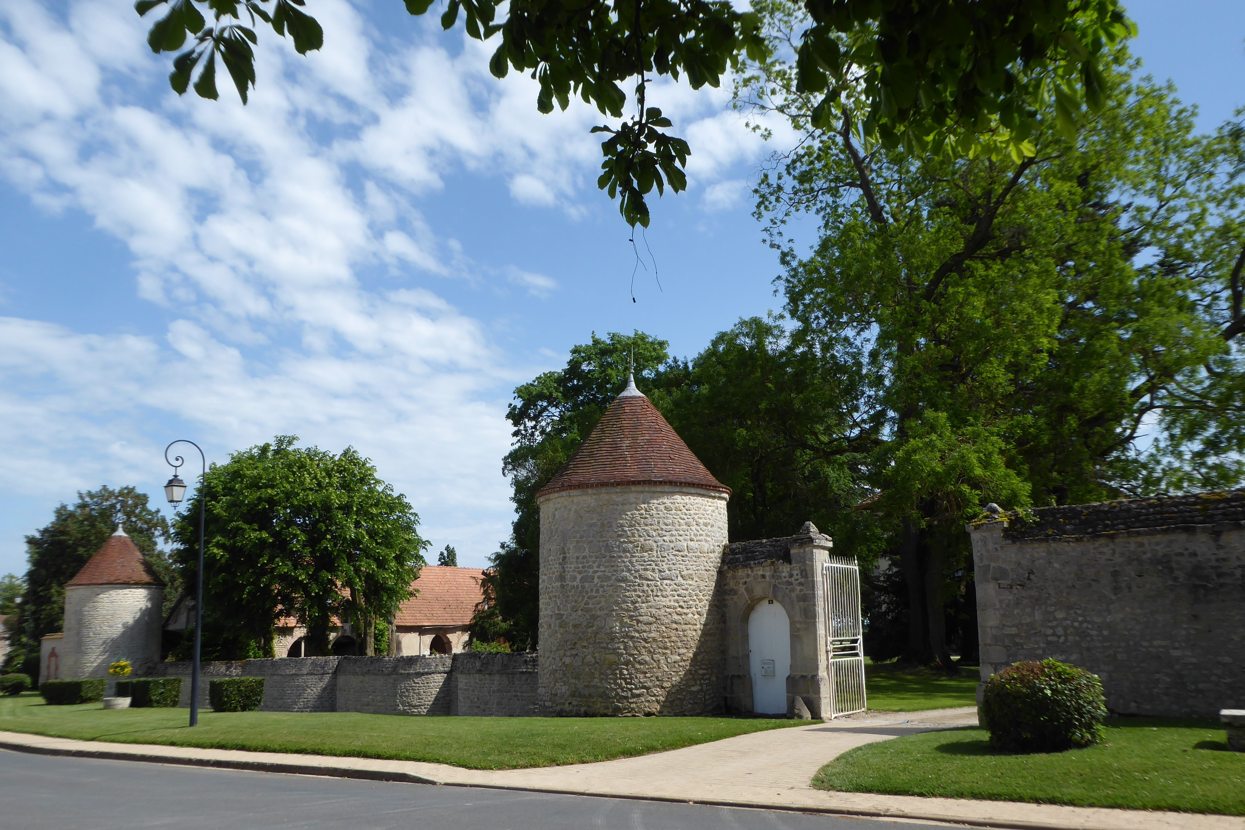 château de Fains-la-Folie, Eure-et-Loir, France.